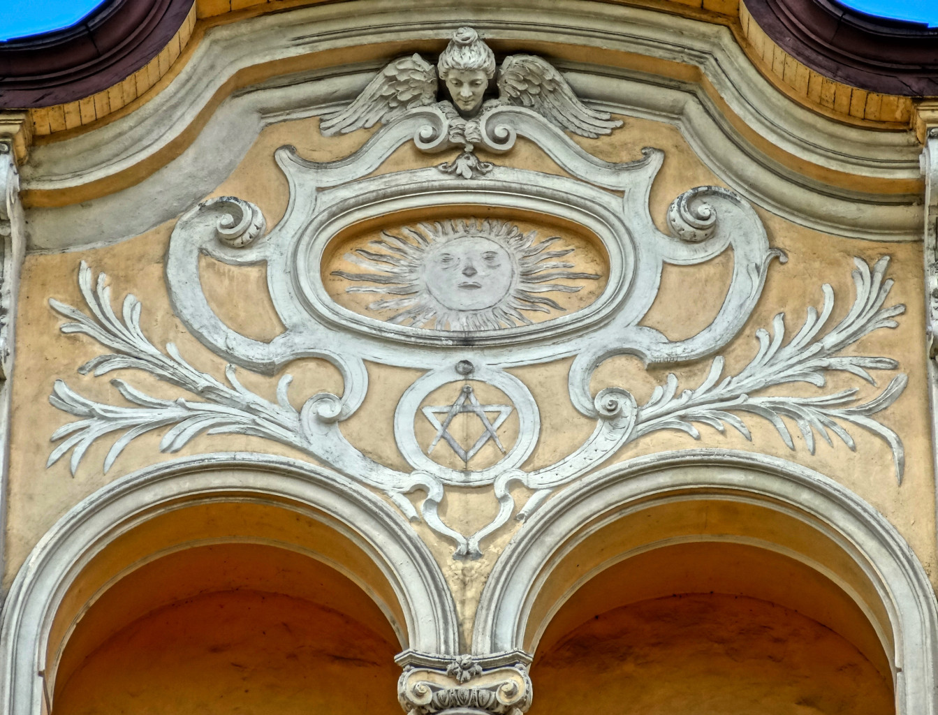 Kamienica przy ul. Gdańskiej 63 w Bydgoszczy - róg ul. Cieszkowskiego